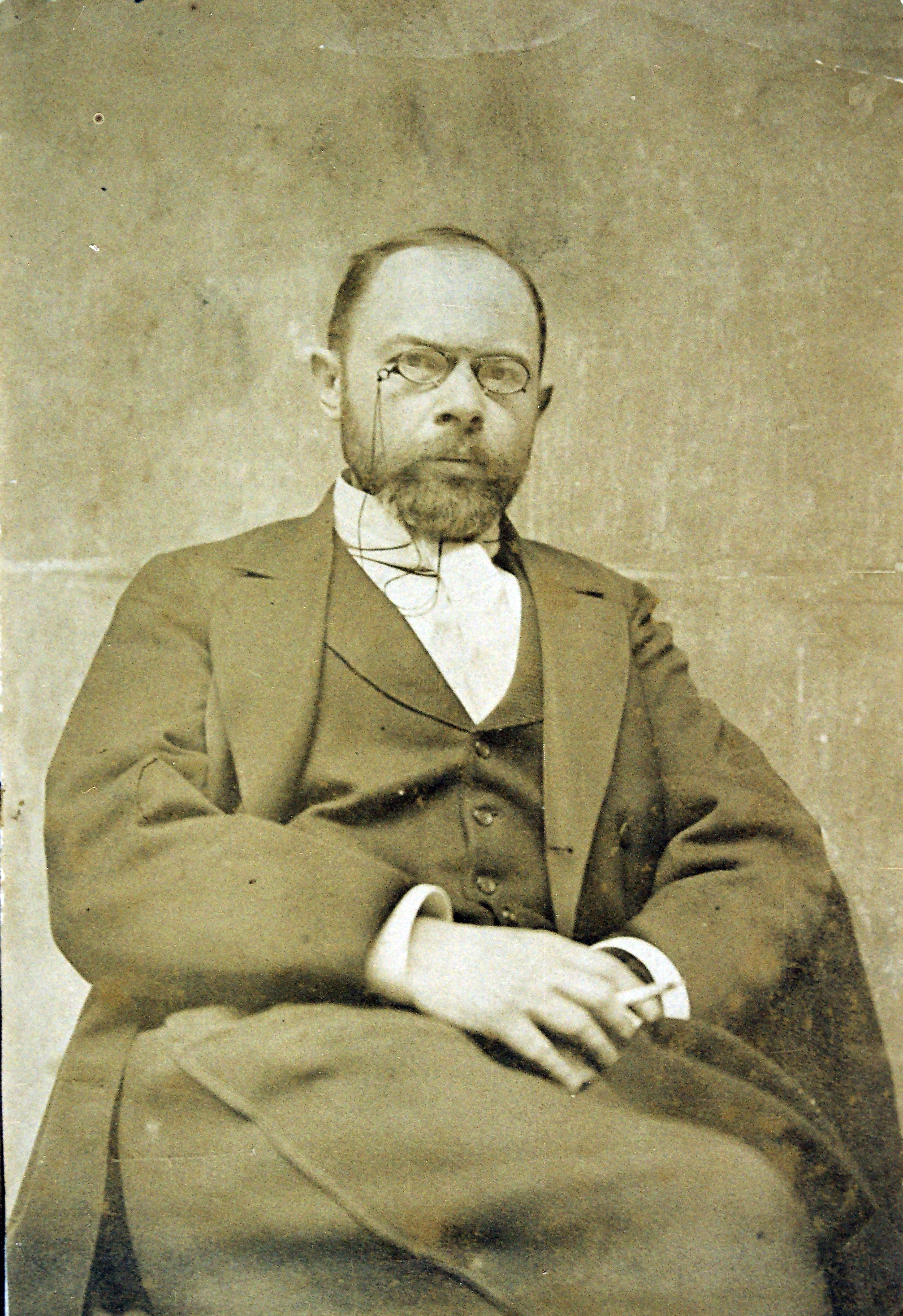 Біляші́вський Мико́ла Федо́тович (12 (24) жовтня 1867, Умань — 26 квітня 1926, Канів) — український археолог, етнограф, мистецтвознавець, громадський діяч. Член Київського товариства старожитностей і мистецтв.